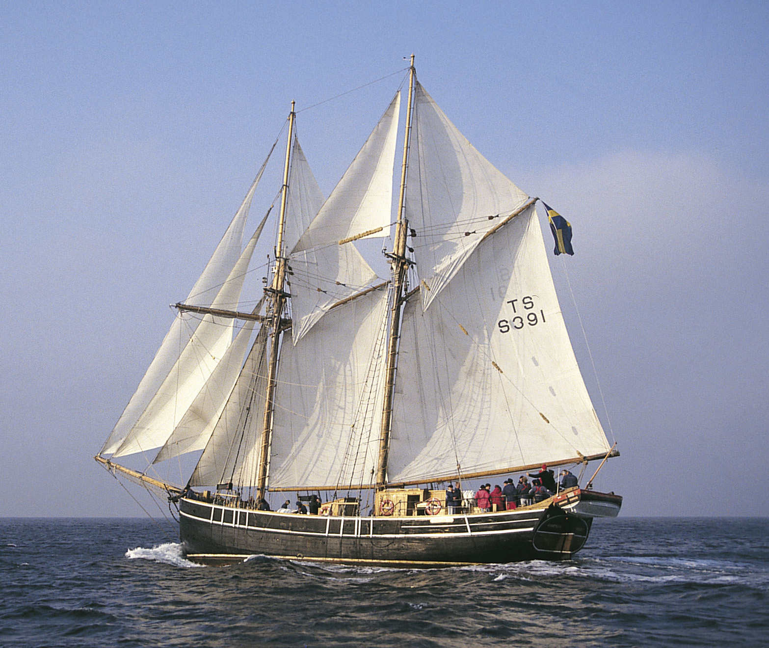 En bild på när T/S Kvartsita seglar med fulla segel This is an image of the protected Swedish ship T/S Kvartsita, with call sign SLOY .